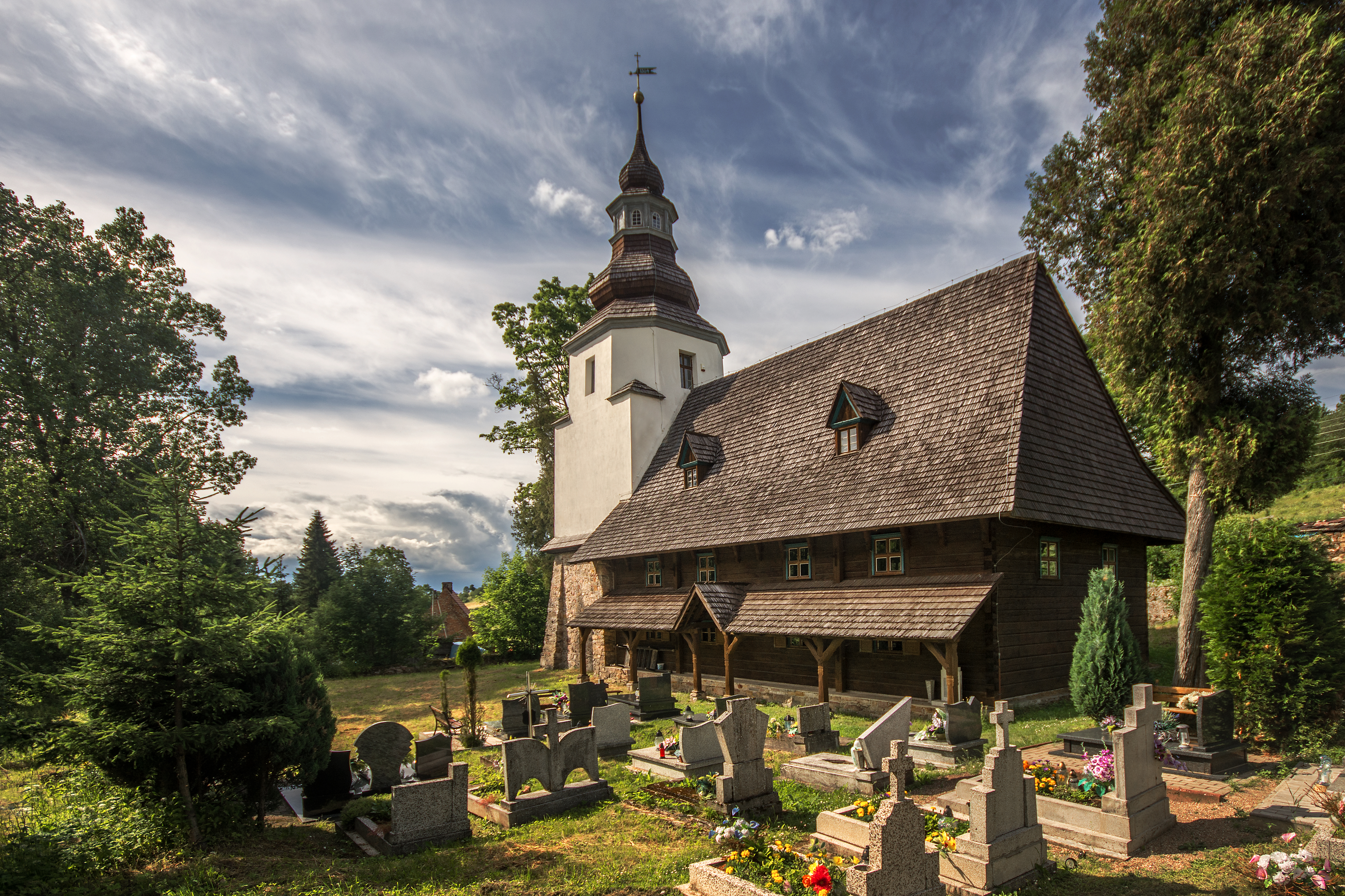 Sierpnica, kościół ewangelicki, ob. rzym.-kat. fil. p.w. Matki Boskiej Śnieżnej, drewn., wieża, mur.XVI